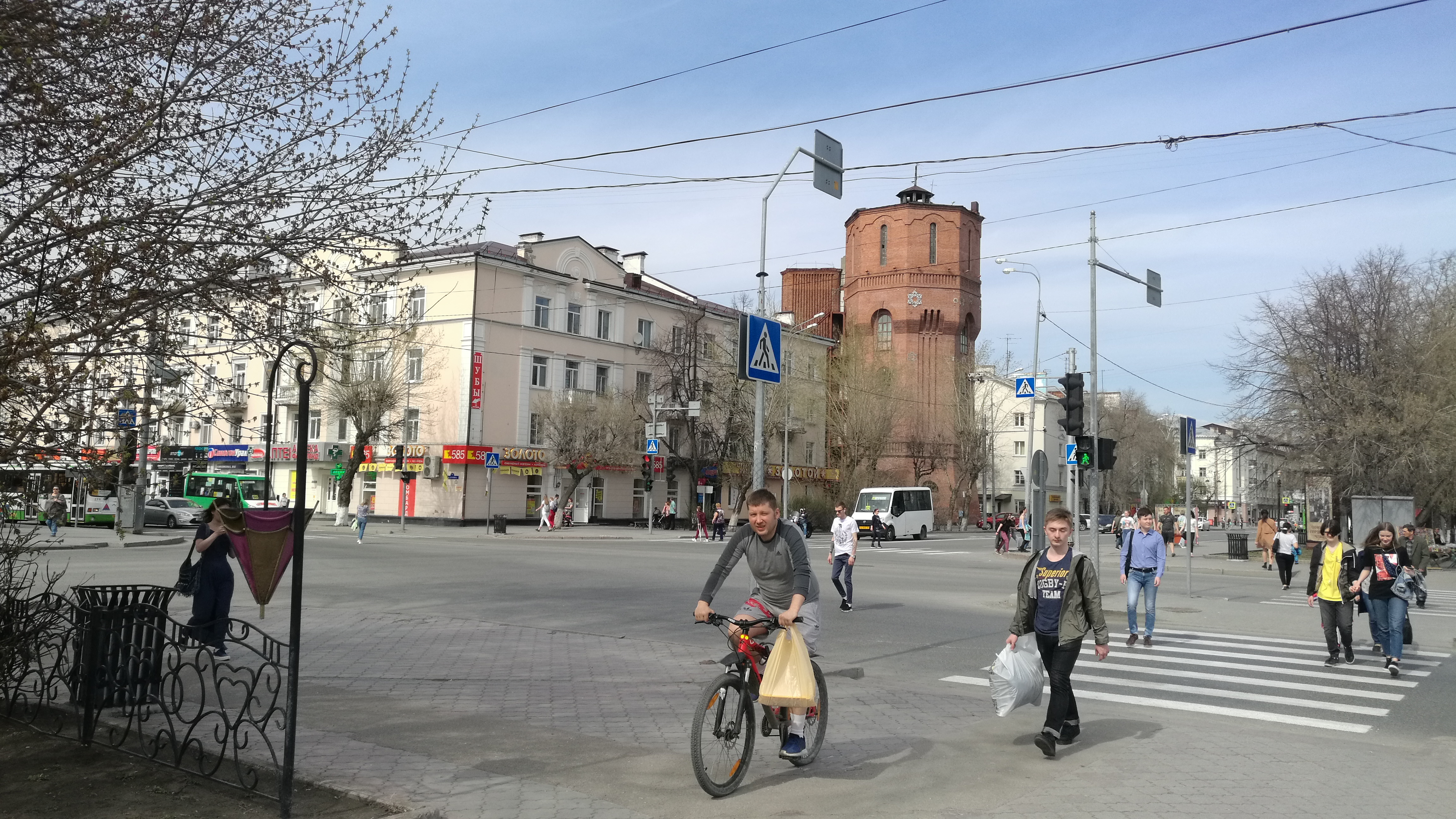 Strato Orĝonikidze. Tjumeno, Rusio.